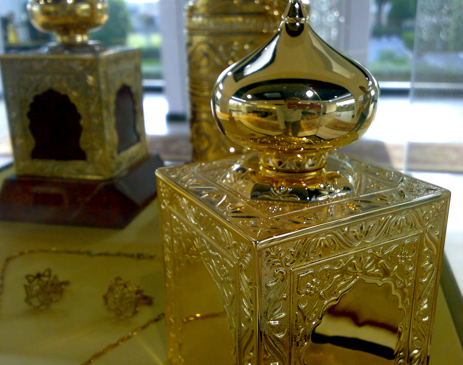 Parfum Amouage, réputé "le plus cher du monde" (Mascate, Oman)